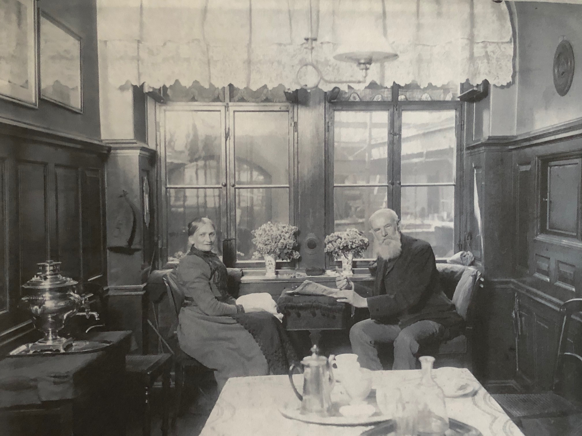 Christoph Albert Bierling, Fotografie von ca. 1899